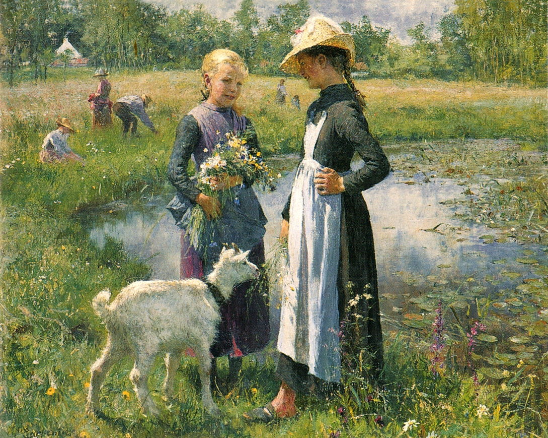 Evariste Carpentier (1845-1922)